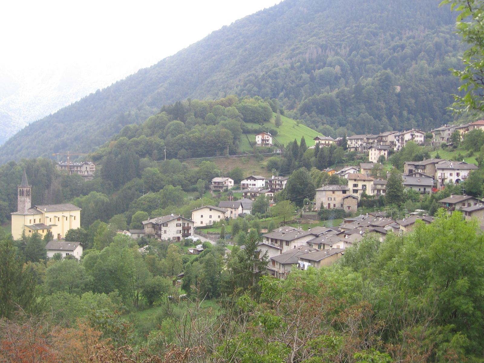 Moio de’ Calvi, Bergamo, Italy